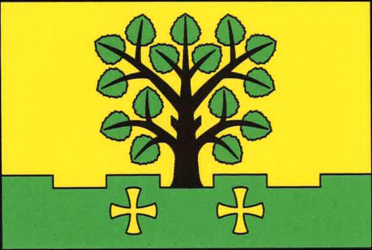 Osiky vlajka